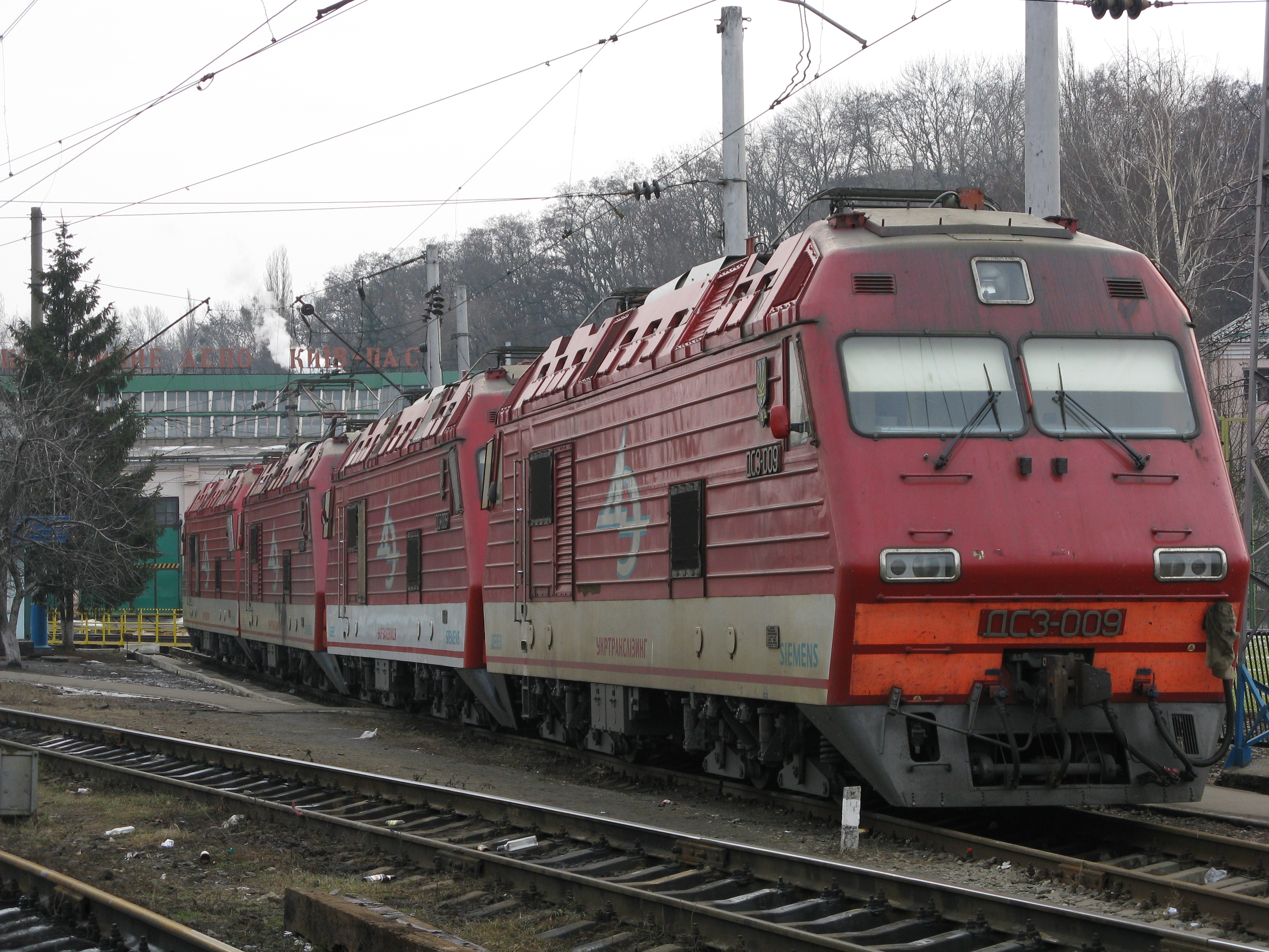 Электровозы ДС3 у локомотивного депо Киев-пассажирский. DS3 electric locomotives parked near Traction Depot 1 at Kiev-pass. station, Kiev, Ukraine.